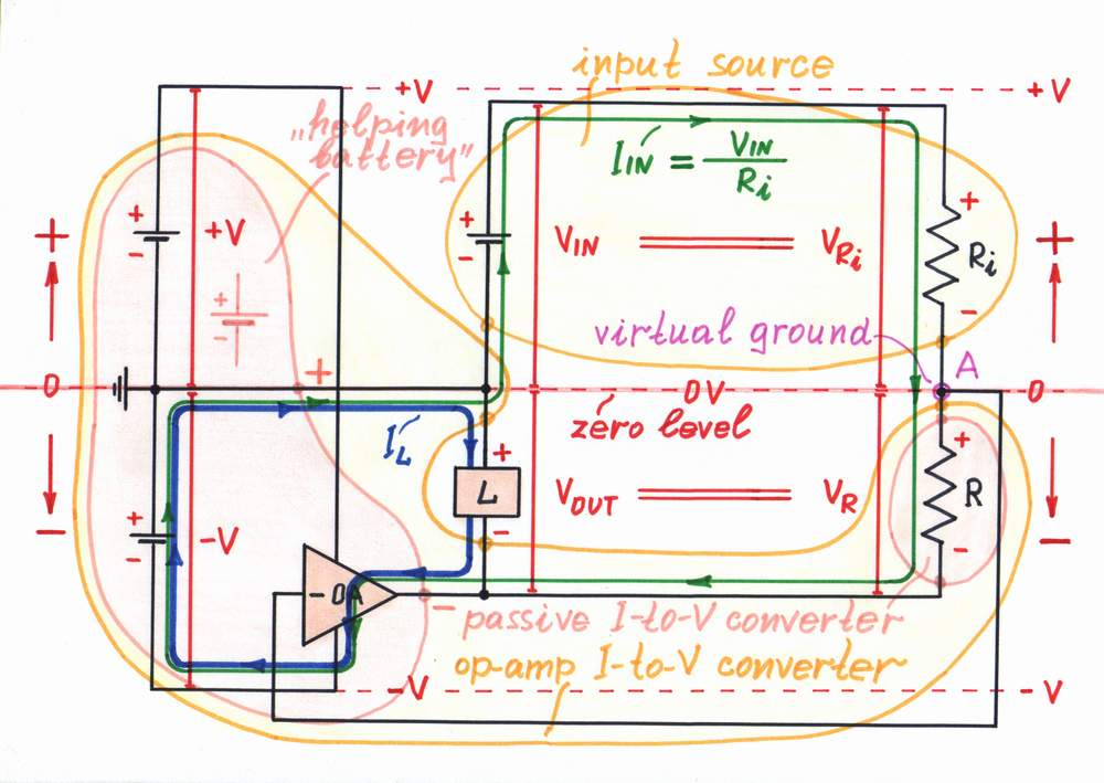 Op-amp inverting current-to-voltage converter (at positive input voltage)